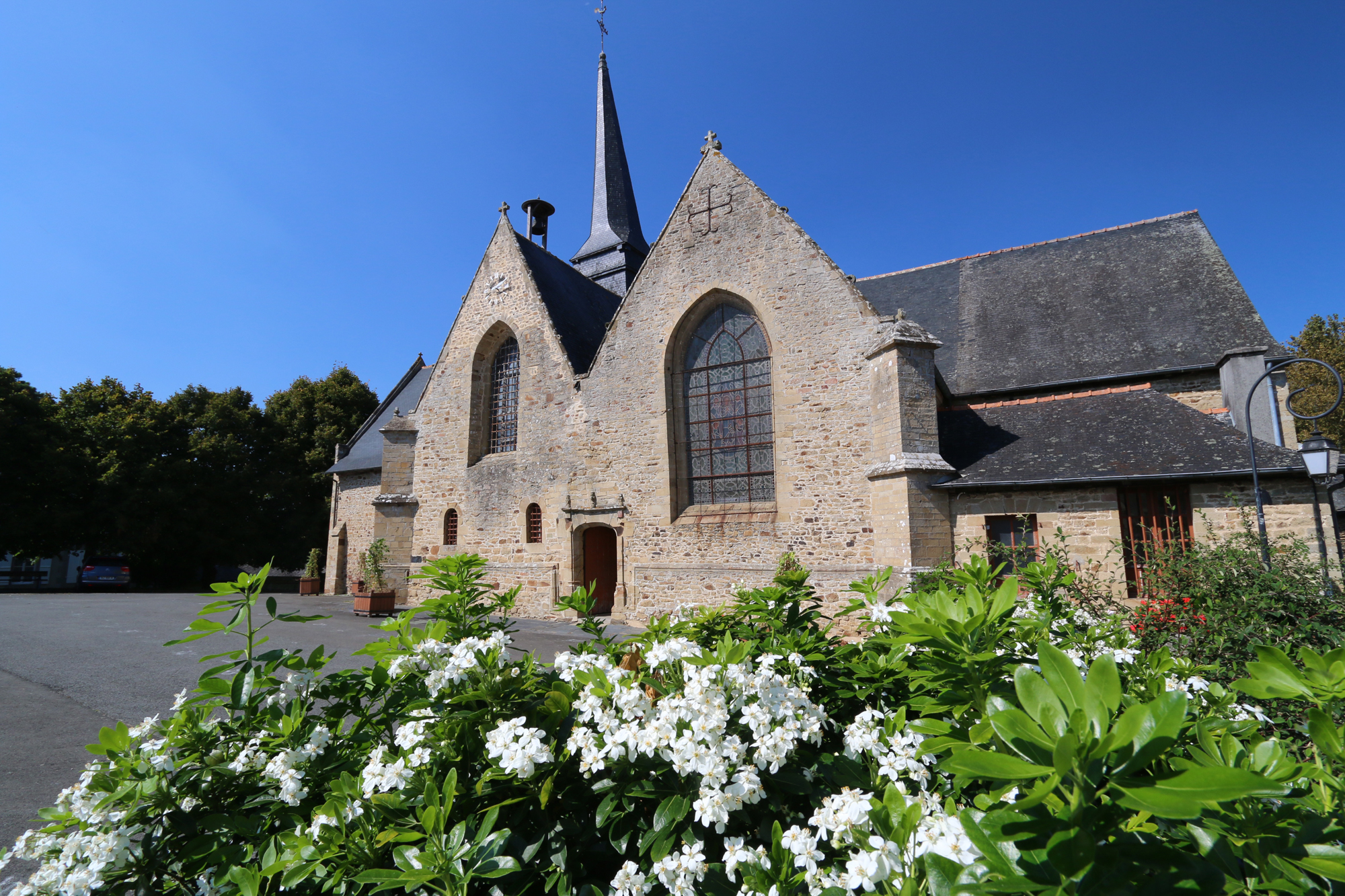 Église Saint-Martin de Moulins (Ille-et-Vilaine)